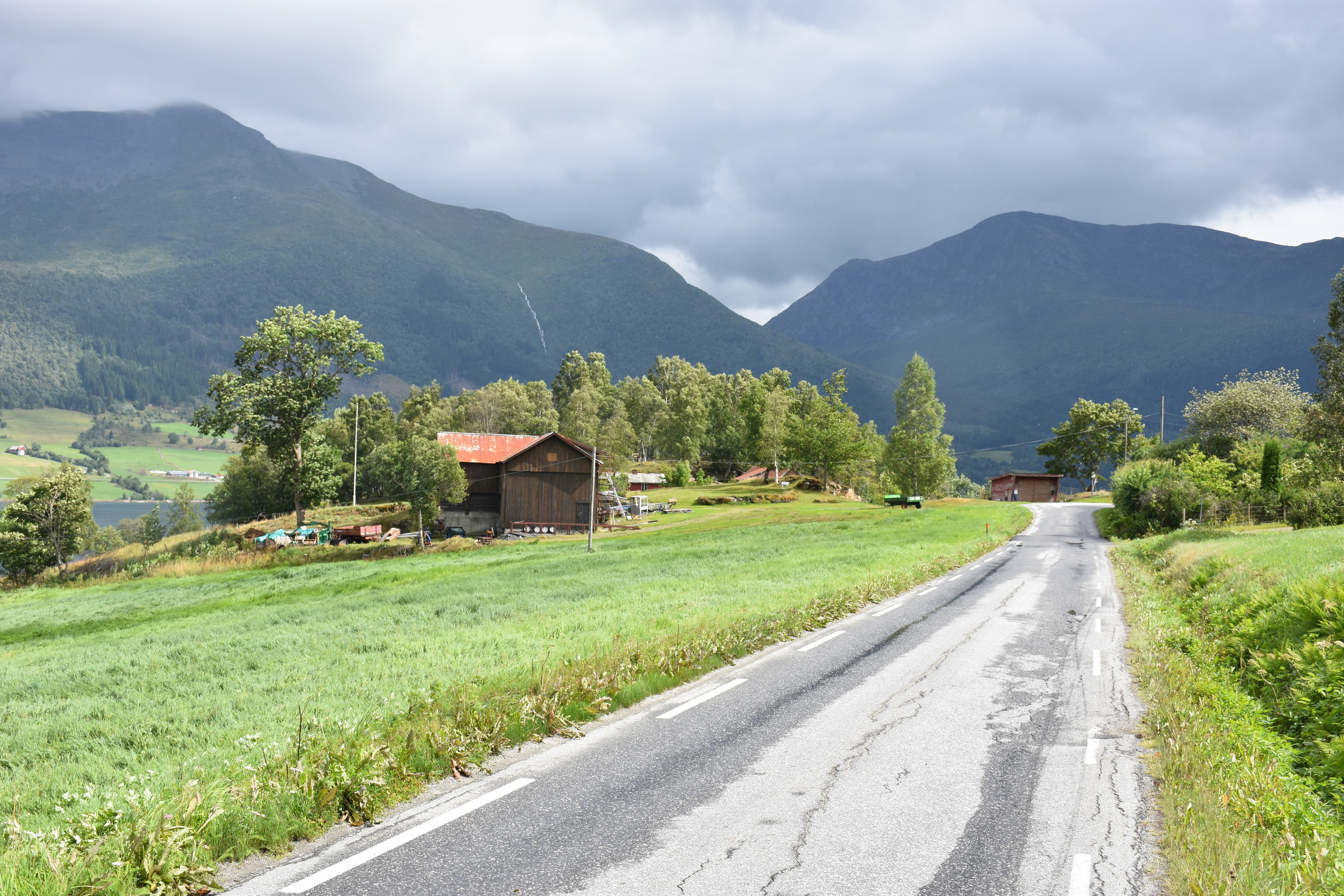 Rødvenvegen (fylkesvei 182)